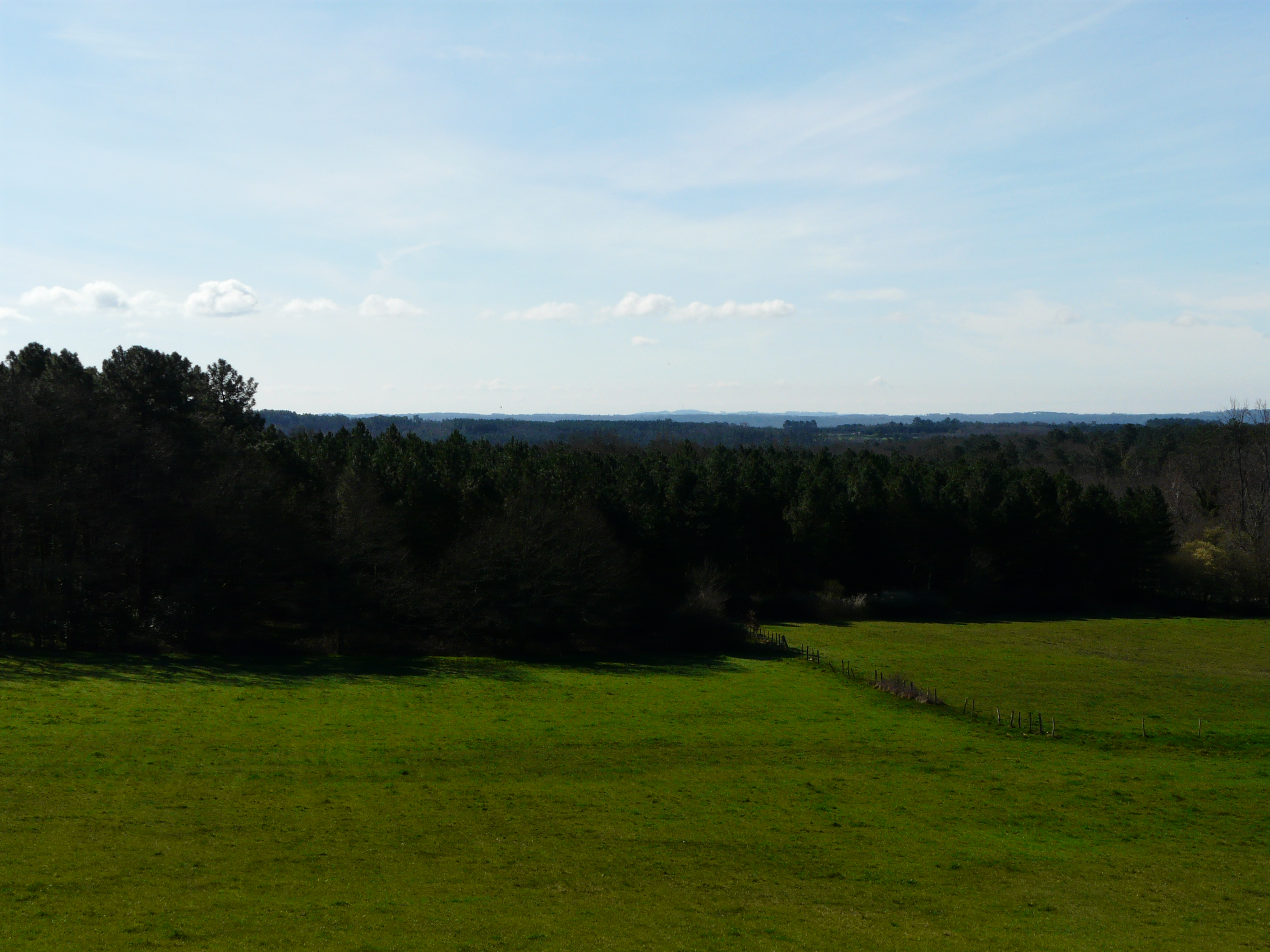 La forêt de la Double vue depuis le village de Saint-Barthélemy-de-Bellegarde, Dordogne, France. Vue prise en direction du sud.